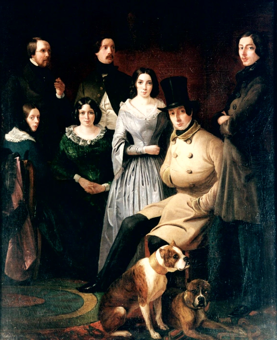 Friedrich Anton Wyttenbach: Familienporträt, 1844, Öl auf Leinwand, auf Holz aufgezogen, 62 x 50 cm, Stadtmuseum Simeonstift Trier, Inv. Nr. III 68.